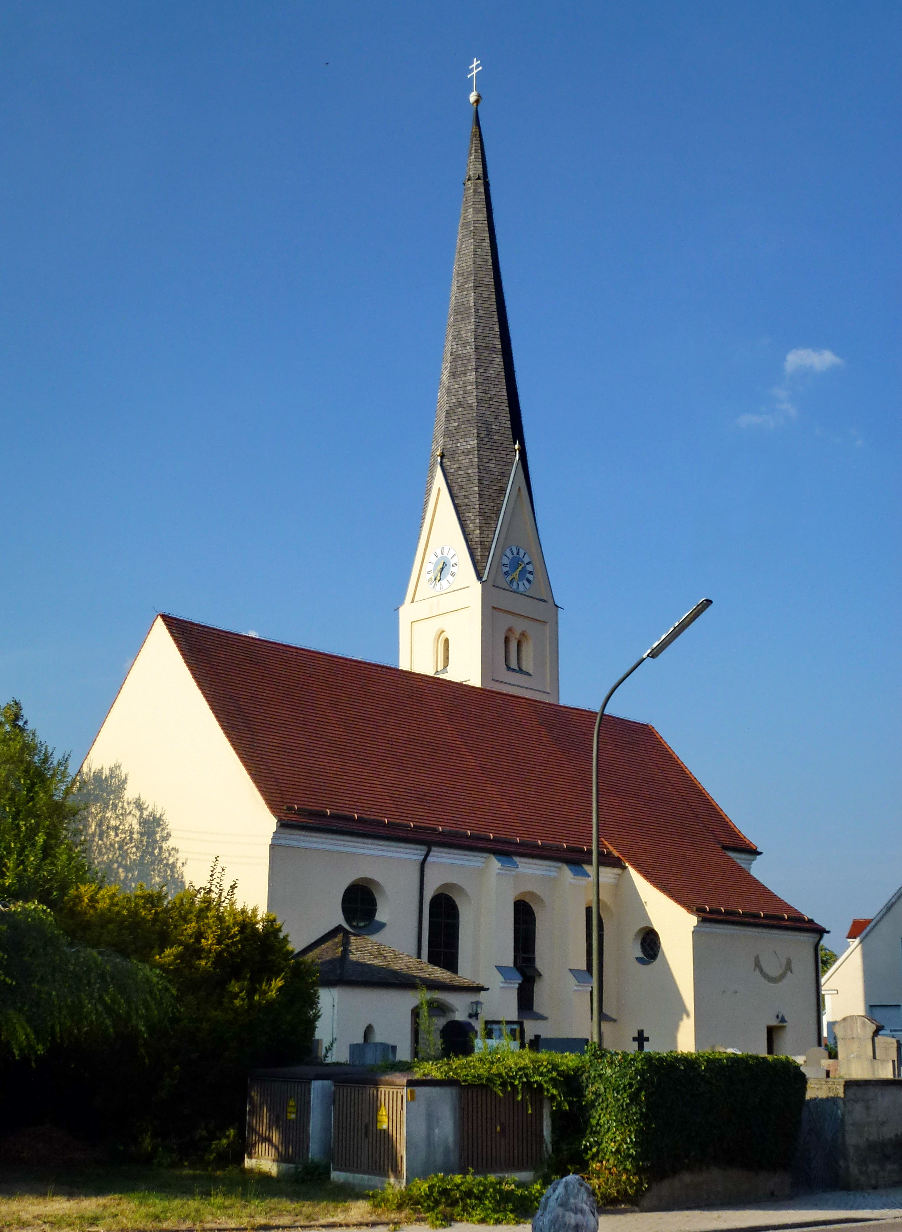 Pellheim, Dorfstr.14: Katholische Pfarrkirche St. Ursula. Ansicht von SW